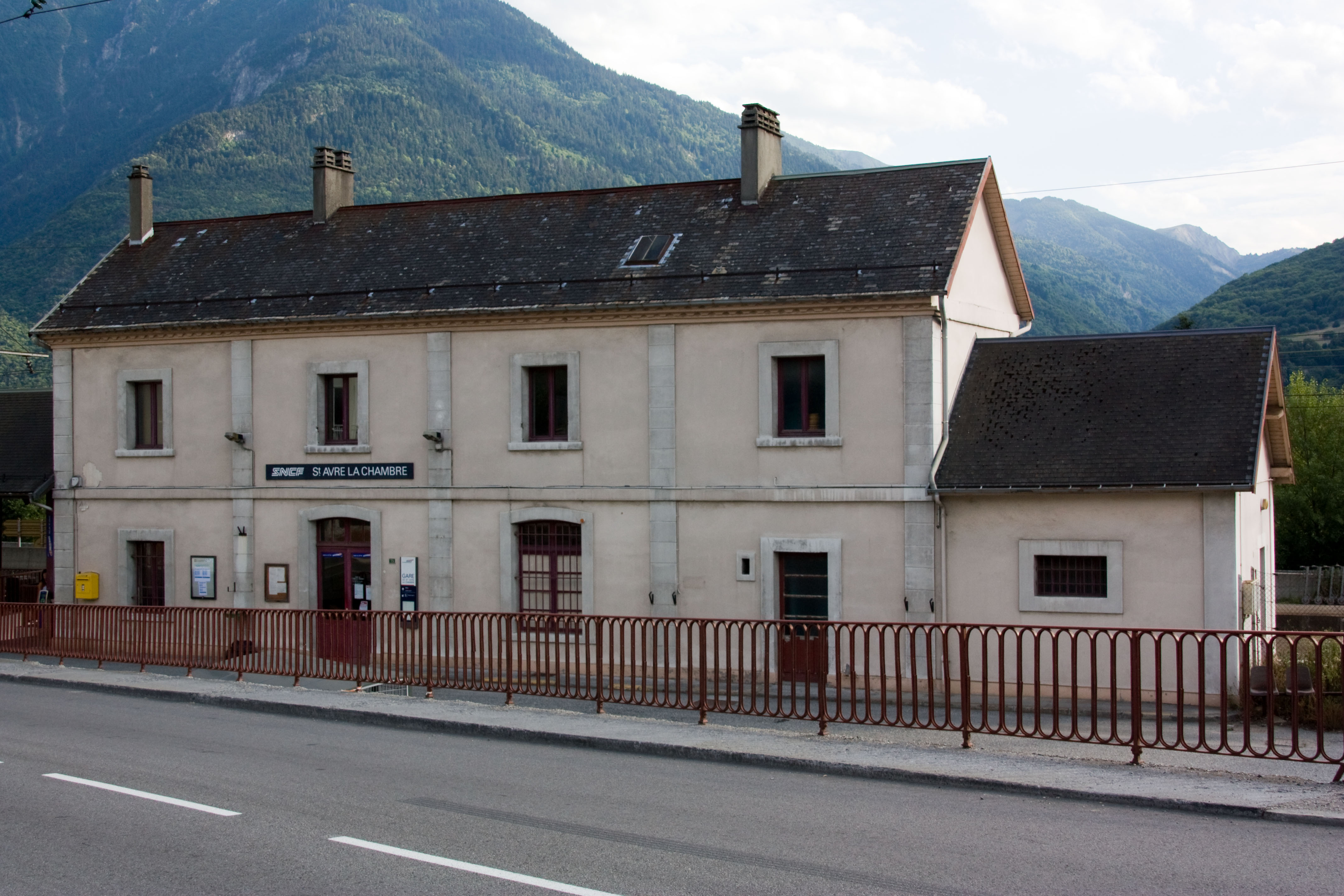 Saint-Avre, Savoie, France